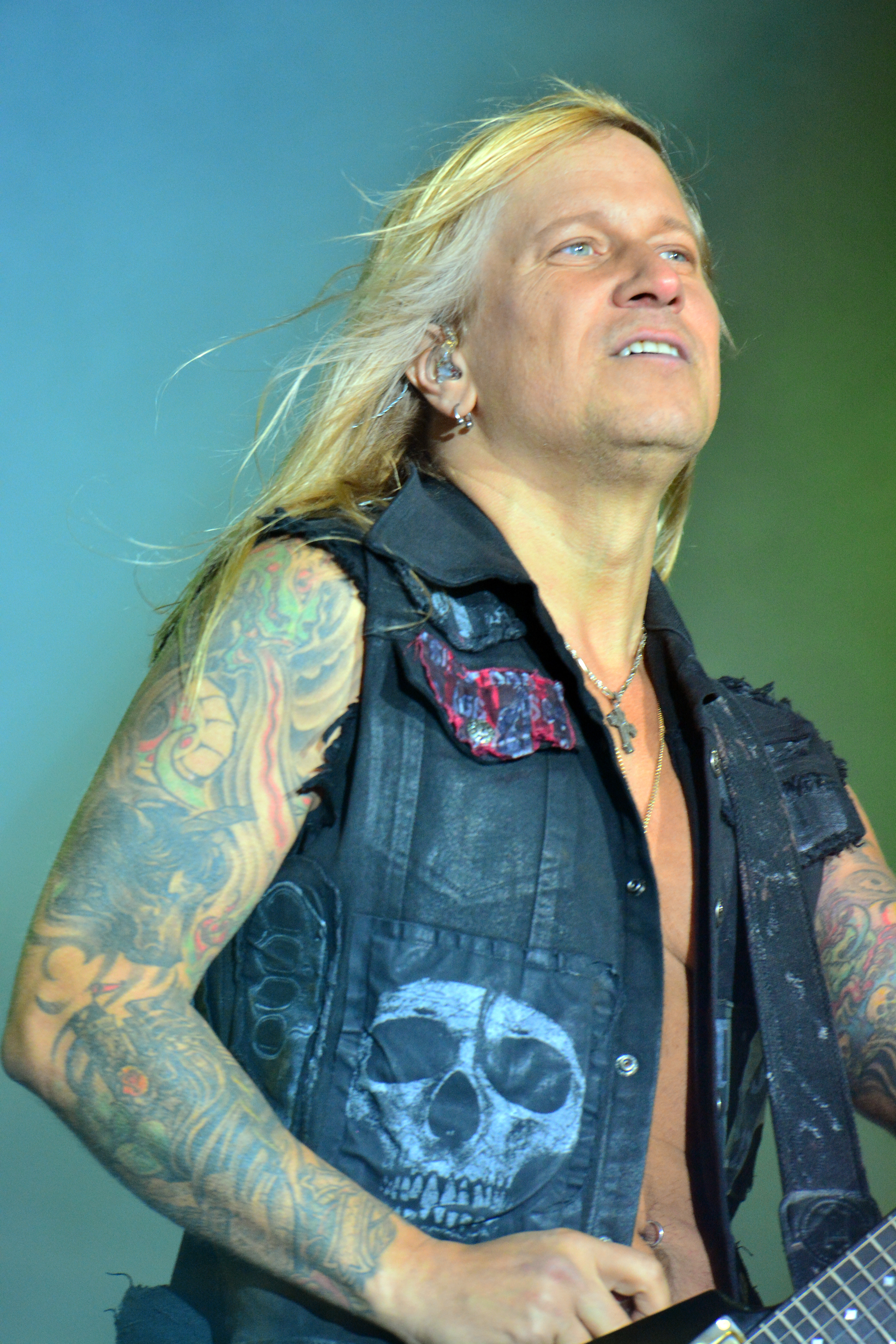 Savatage beim Wacken Open Air 2015